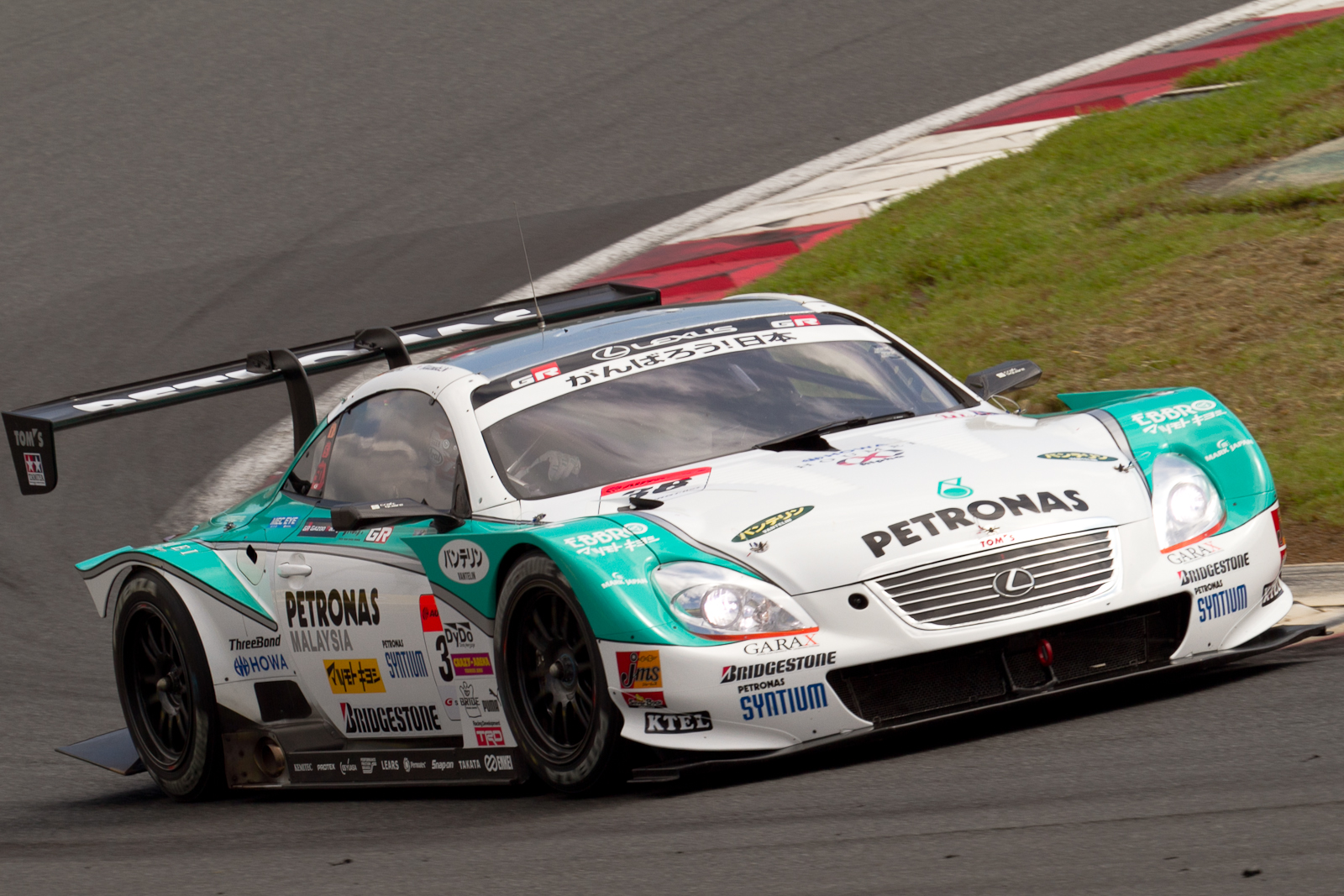 Super GT 2011 Rd.6 Fuji GT 250km: Kazuki Nakajima (TOM'S) driving the Lexus SC GT500.